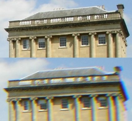 Esta imagen compuesta por dos fotografías tiene como objetivo mostrar los efectos de La aberración cromática aunque puede ser útil para otros propósitos como la diferencia de lentes de alta calidad con lentes de ángulo amplio y demás. En la parte superior encontramos una imagen tomada con lentes de más alta calidad con buen detalle y calidad en sus bordes y sobre todo en las esquinas y partes oscuras, en la parte inferior tenemos una imagen similar tomada con otro lente mostrando la evidente aberración cromática en los bordes y partes contrastantes.